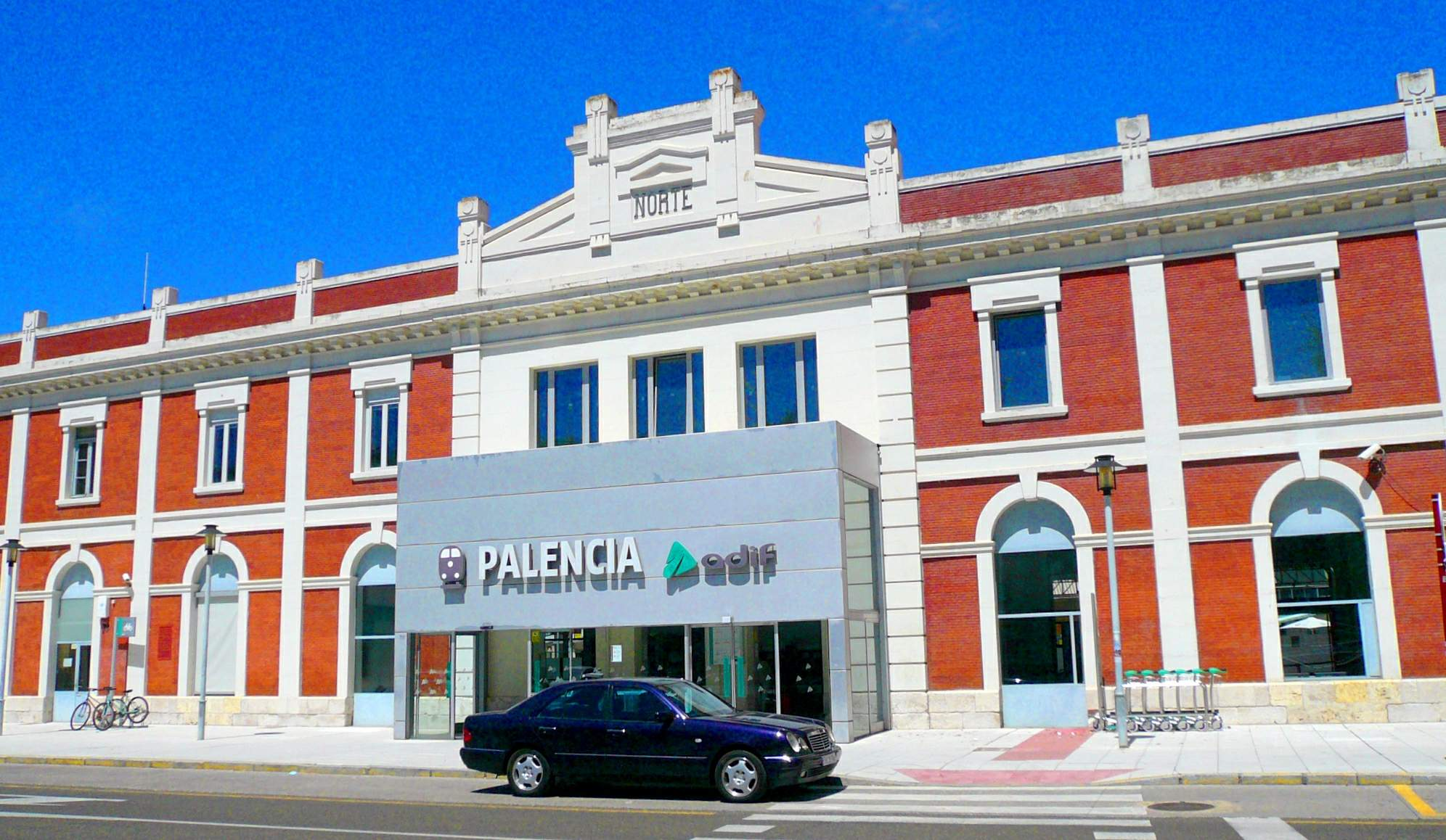 Estación de Adif de Palencia